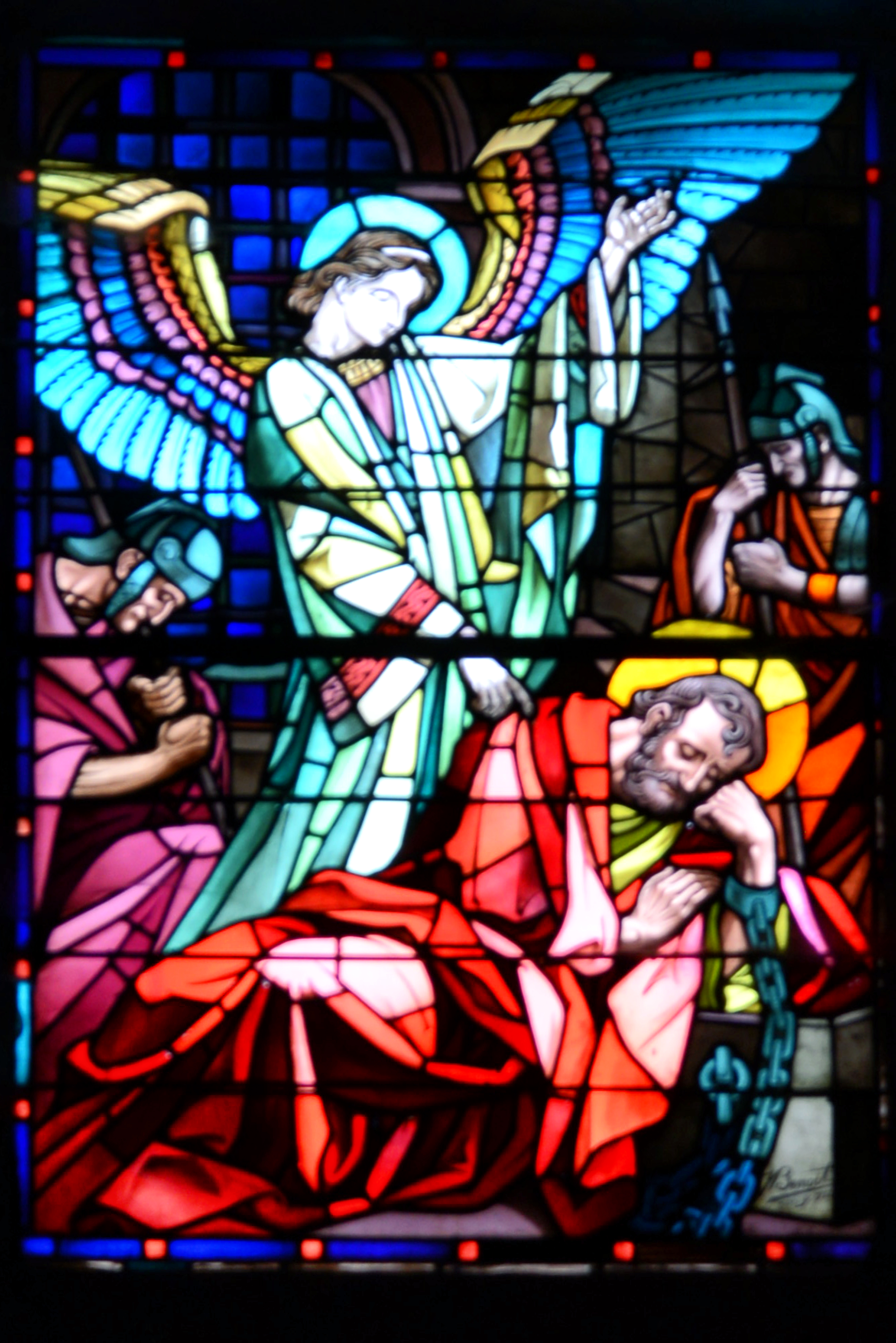 Santo-Pietro-di-Venaco (Corsica) - Vitrail de la façade principale de l'église Saint-Pierre-et-Saint-Paul